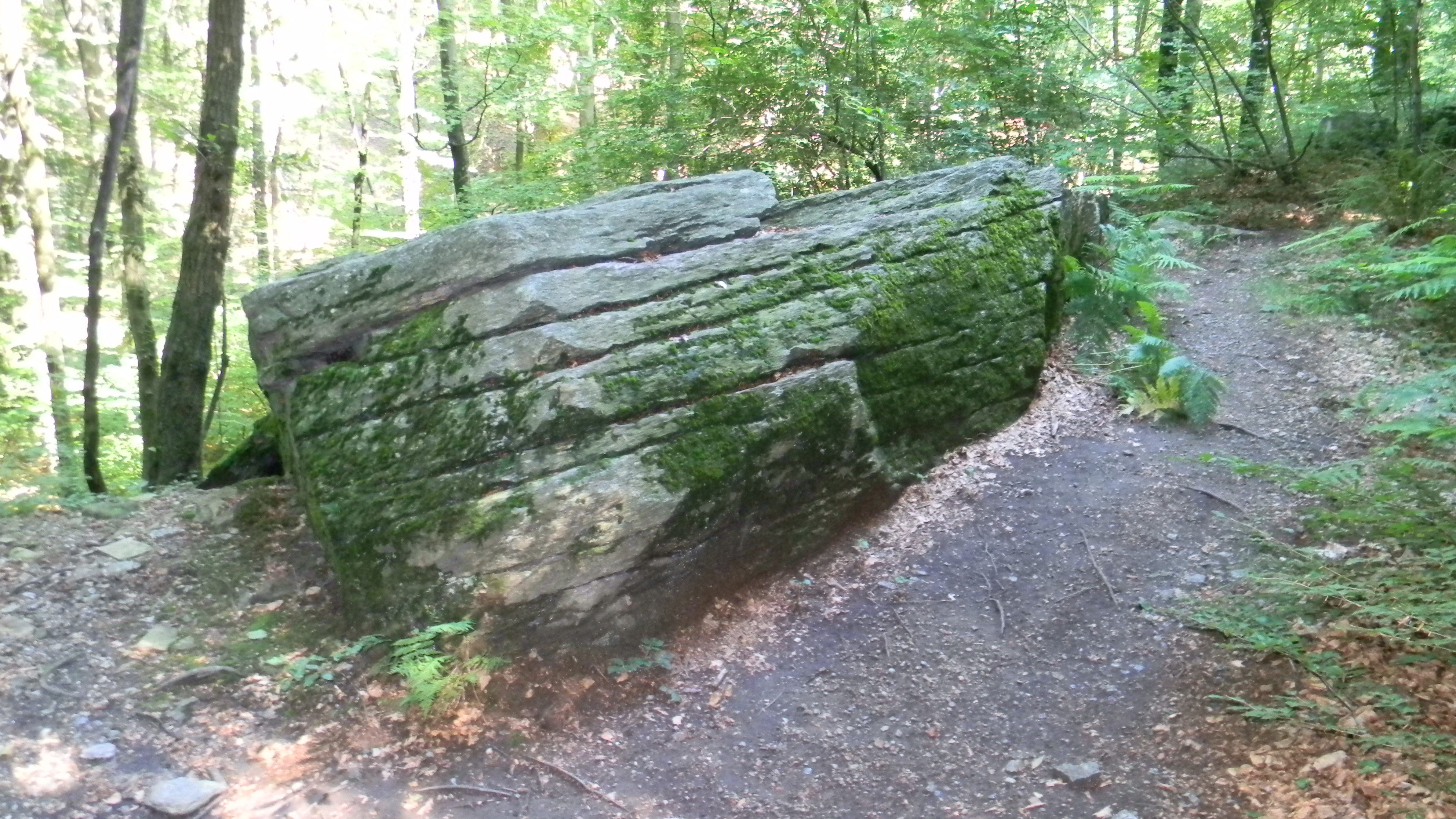 Lato ovest del masso erratico di Brinzio (VA) - Italia